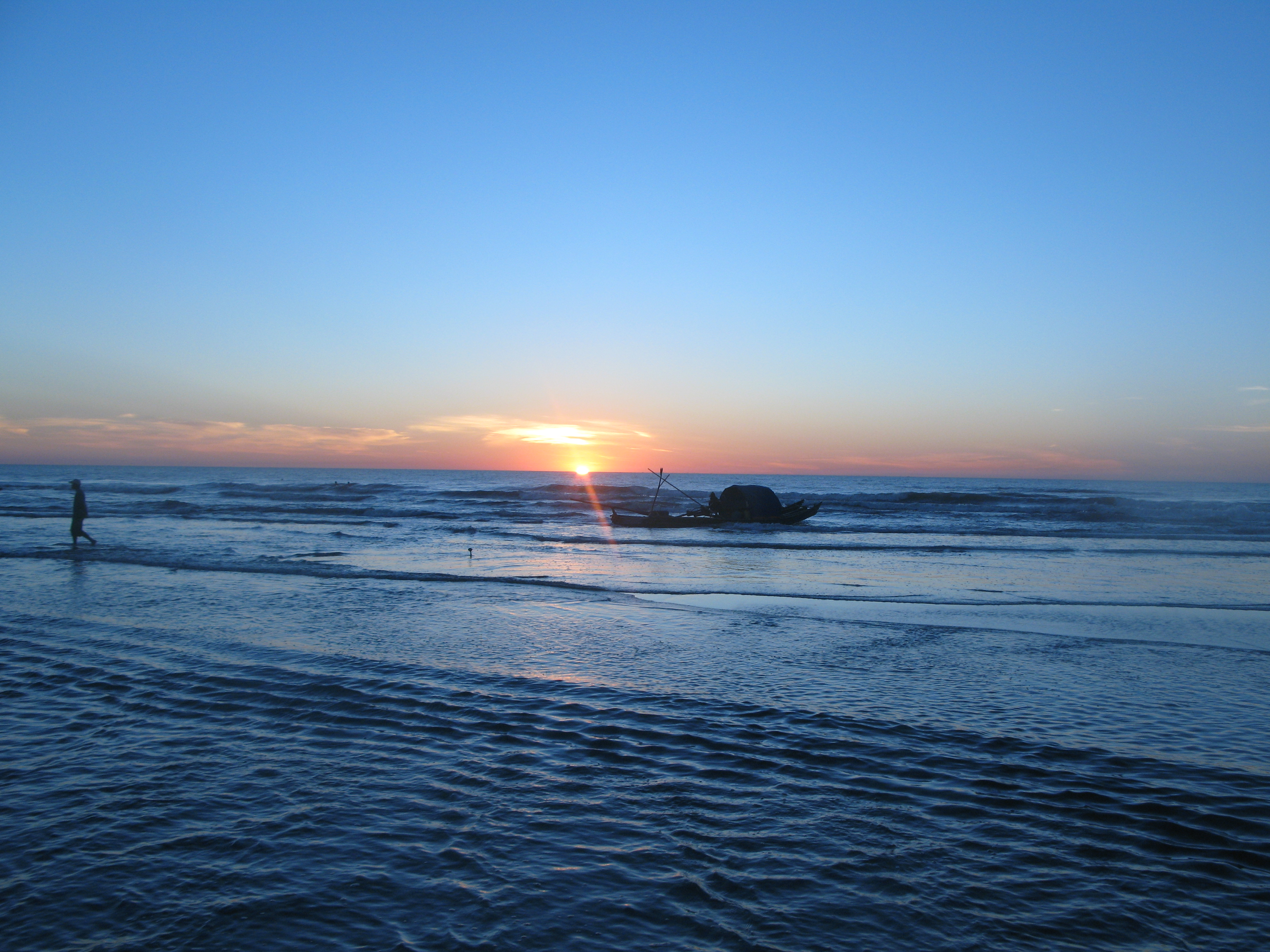 Bình minh trên biển Hải Hòa, Tĩnh Gia, Thanh Hóa.